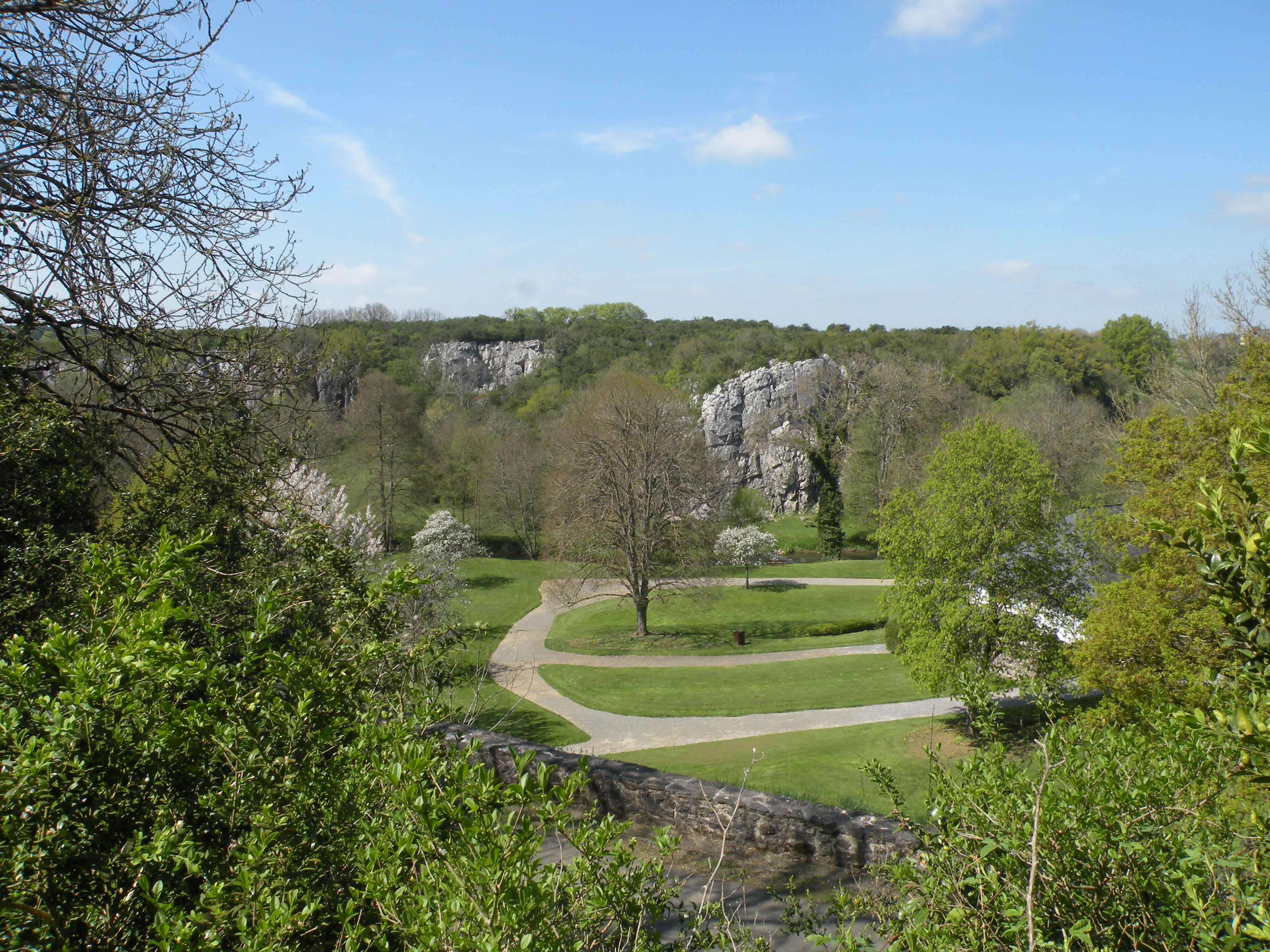 vu sur le domaine des Grottes et Canyon de Saulges